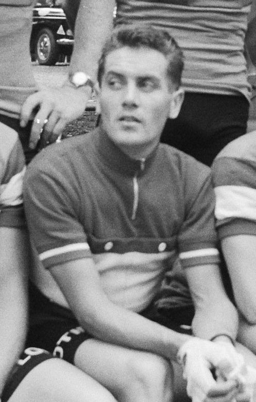 Nationaal Archief Beschrijving: De Nederlandse ploeg, Tour de France 1960 Piet Damen Datum: 28 juni 1960 Bestanddeelnummer 911-3748 Vervaardiger: Anefo / Harry Pot (1929–1996) DescriptionDutch photographer and cinematographerDate of birth/death 1929 1996Work location Amsterdam, BentveldAuthority control : Q27877051 VIAF: 284191334 ISNI: 0000 0003 9050 874X Koninklijke: 073478326 creator QS:P170,Q27877051 URL: Voor meer informatie over het Nationaal Archief: Voor meer foto's uit deze en andere collecties, bezoek onze Beeldbank:, U kunt ons helpen onze kennis van de fotocollecties te verrijken door tags en commentaren toe te voegen. Herkent u mensen of locaties of heeft u een bijzonder verhaal te vertellen bij één van de foto's, laat dan een reactie achter (als u ingelogd bent bij Flickr) of stuur een mailtje naar